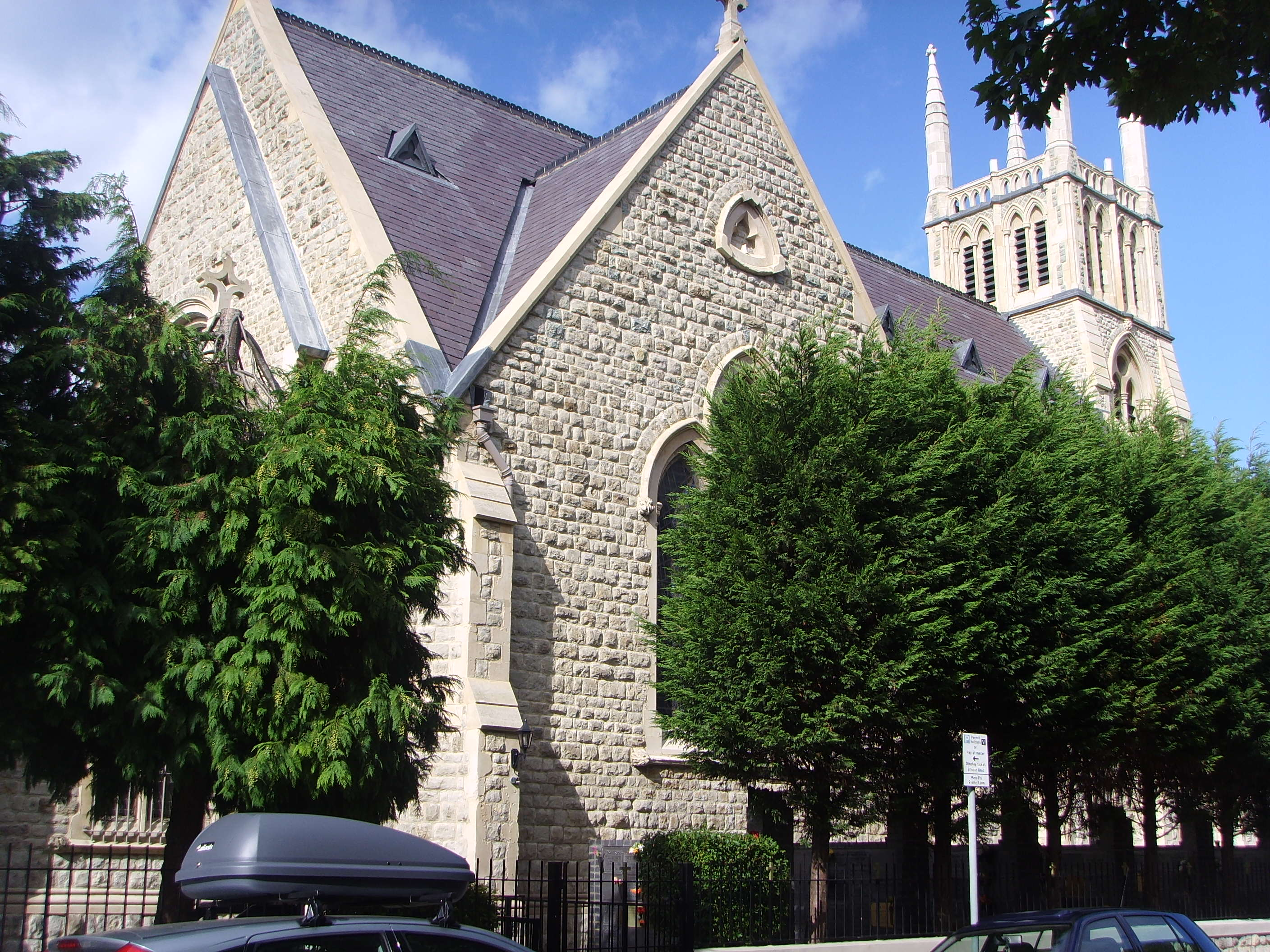 Kościół pod wezwaniem Andrzeja Boboli w Londynie